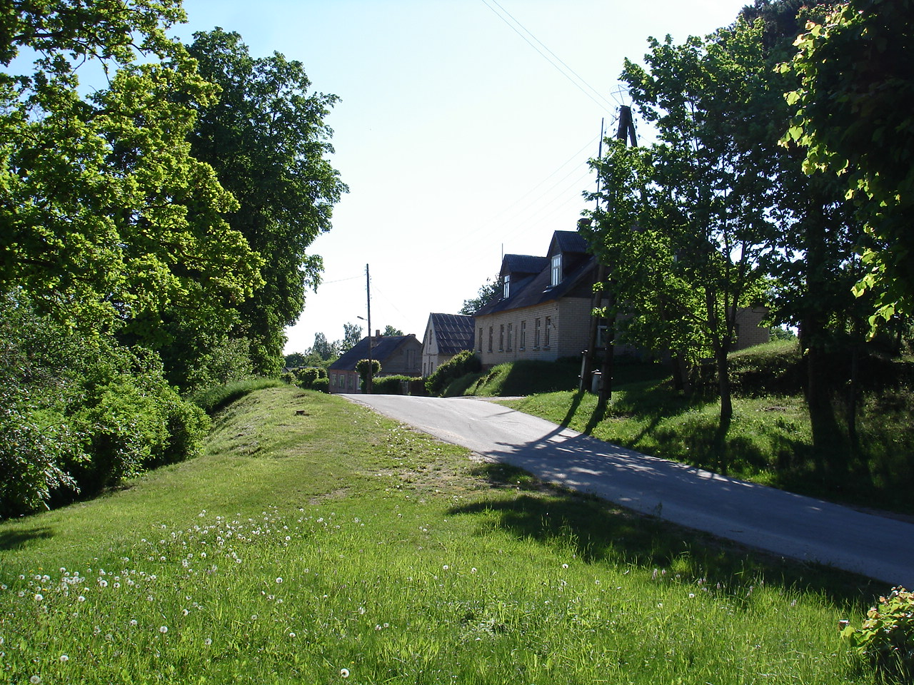 улица